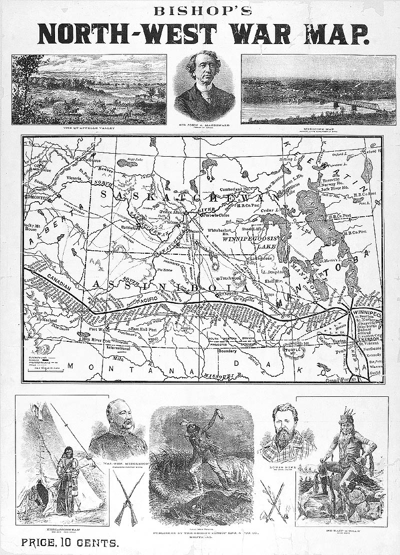 Plakat mit Karte zur Nordwest-Rebellion, neben der Karte mit Bildern, die bis auf das Porträt Riels nichts mit der Rebellion zu tun haben (laut Kommentar bei der Quelle).